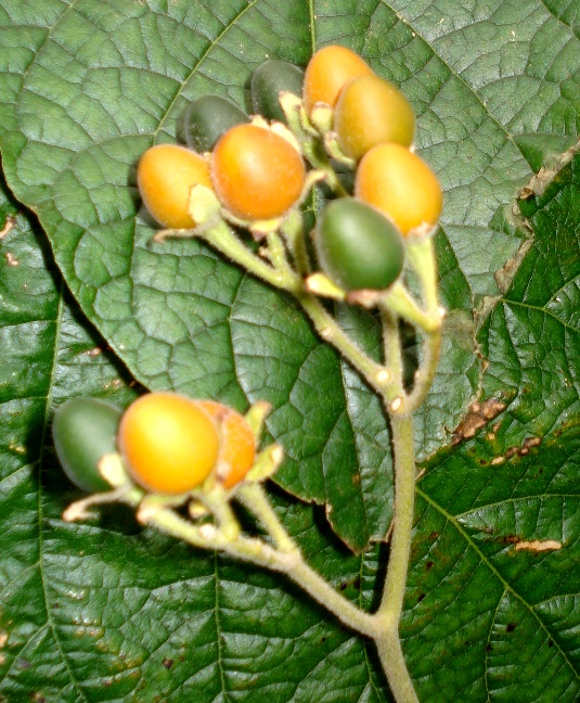 Fruechte von Solanum abutiloides